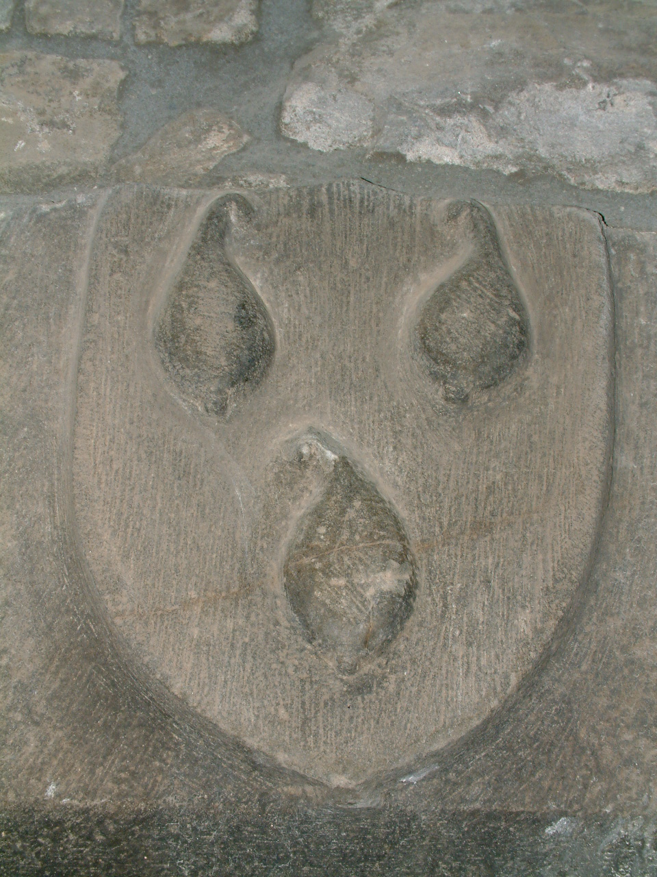 Escudo esculpido en piedra con tres peras.